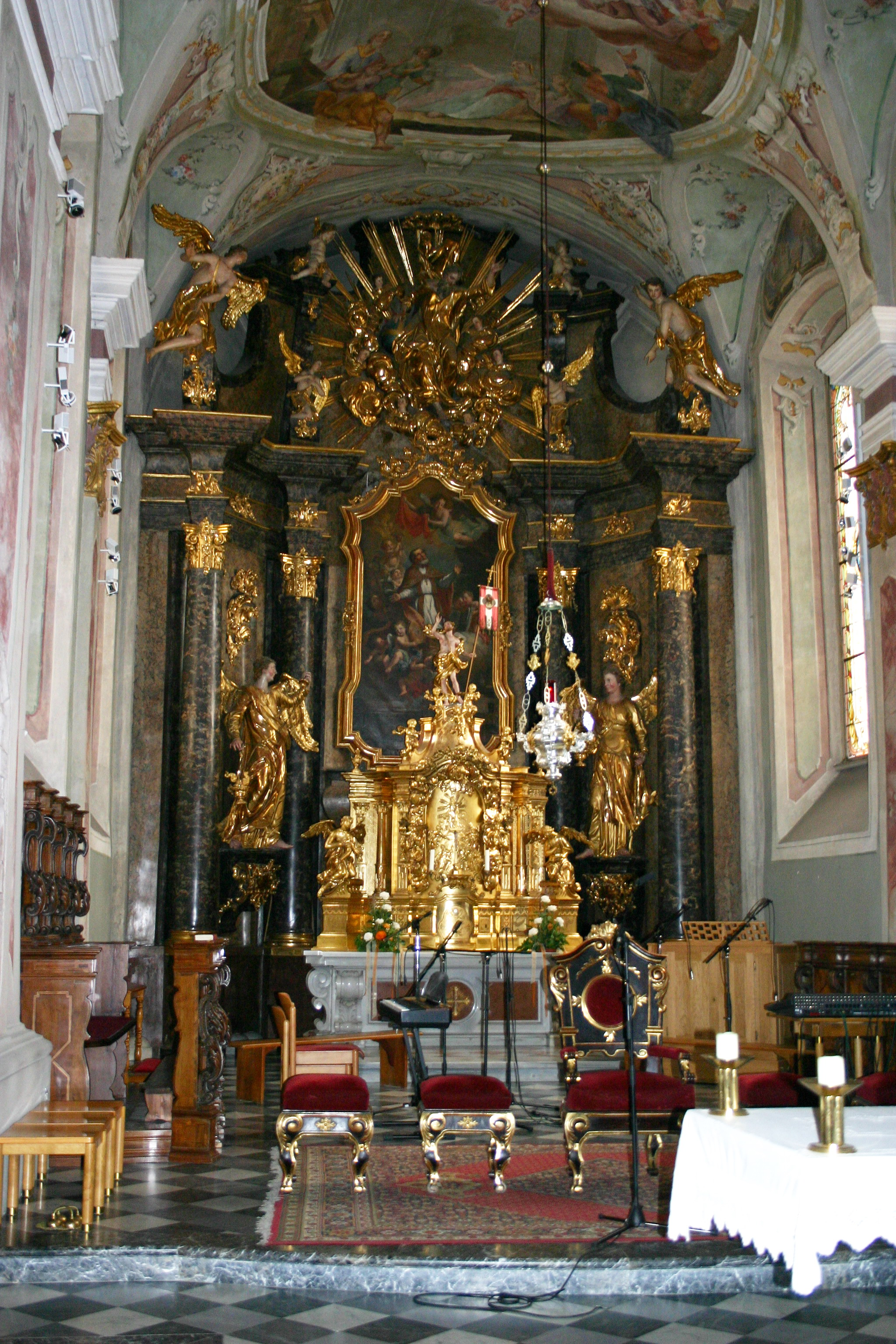 Hartberg Hochaltar der Pfarrkirche